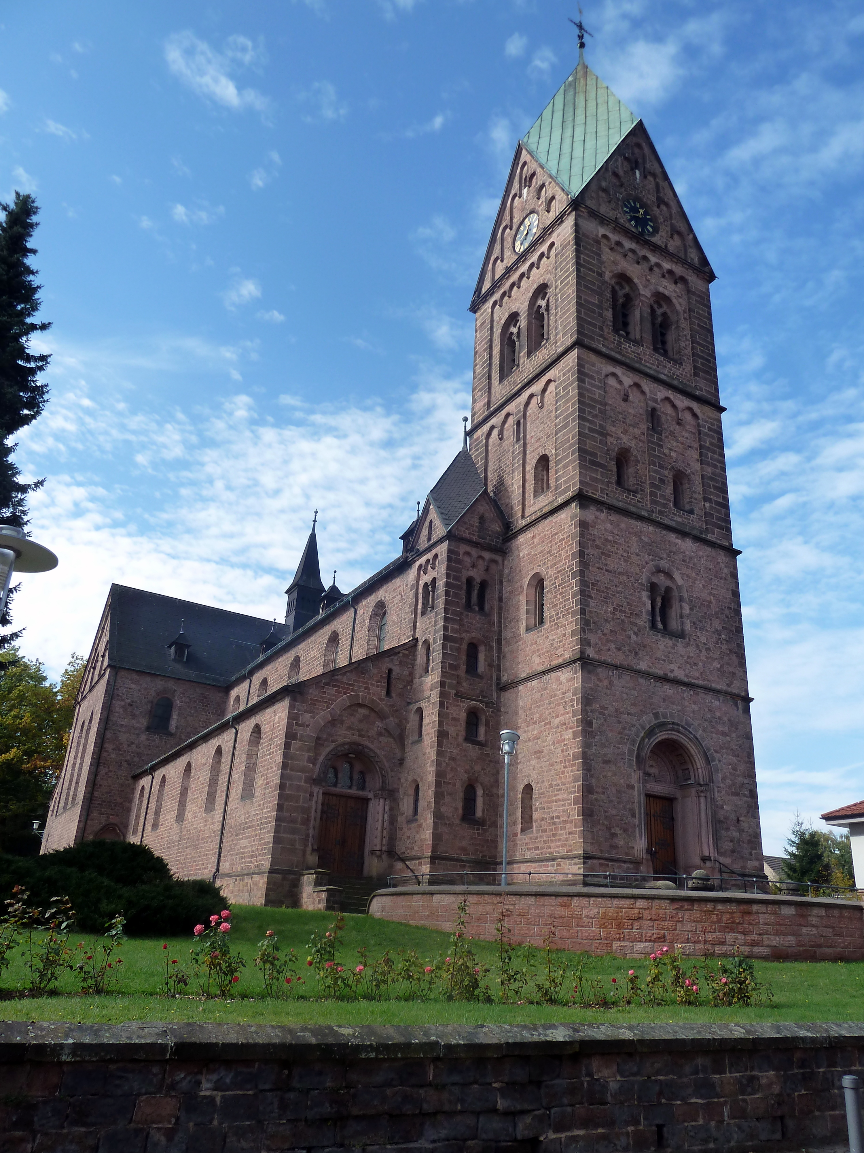 Kath. Kirche St. Nikolaus in Ramstein-Miesenbach.